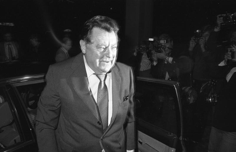 Bundestagswahl: CDU-Wahlparty im Konrad-Adenauer-Haus in Bonn.